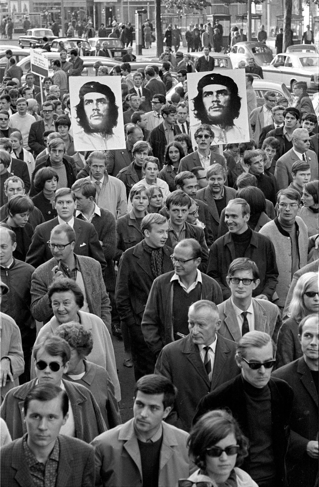 2001_03_0275.0007 Ludwig Binder: Studentenrevolte 1967/68, West-Berlin; veröffentlicht vom Haus der Geschichte